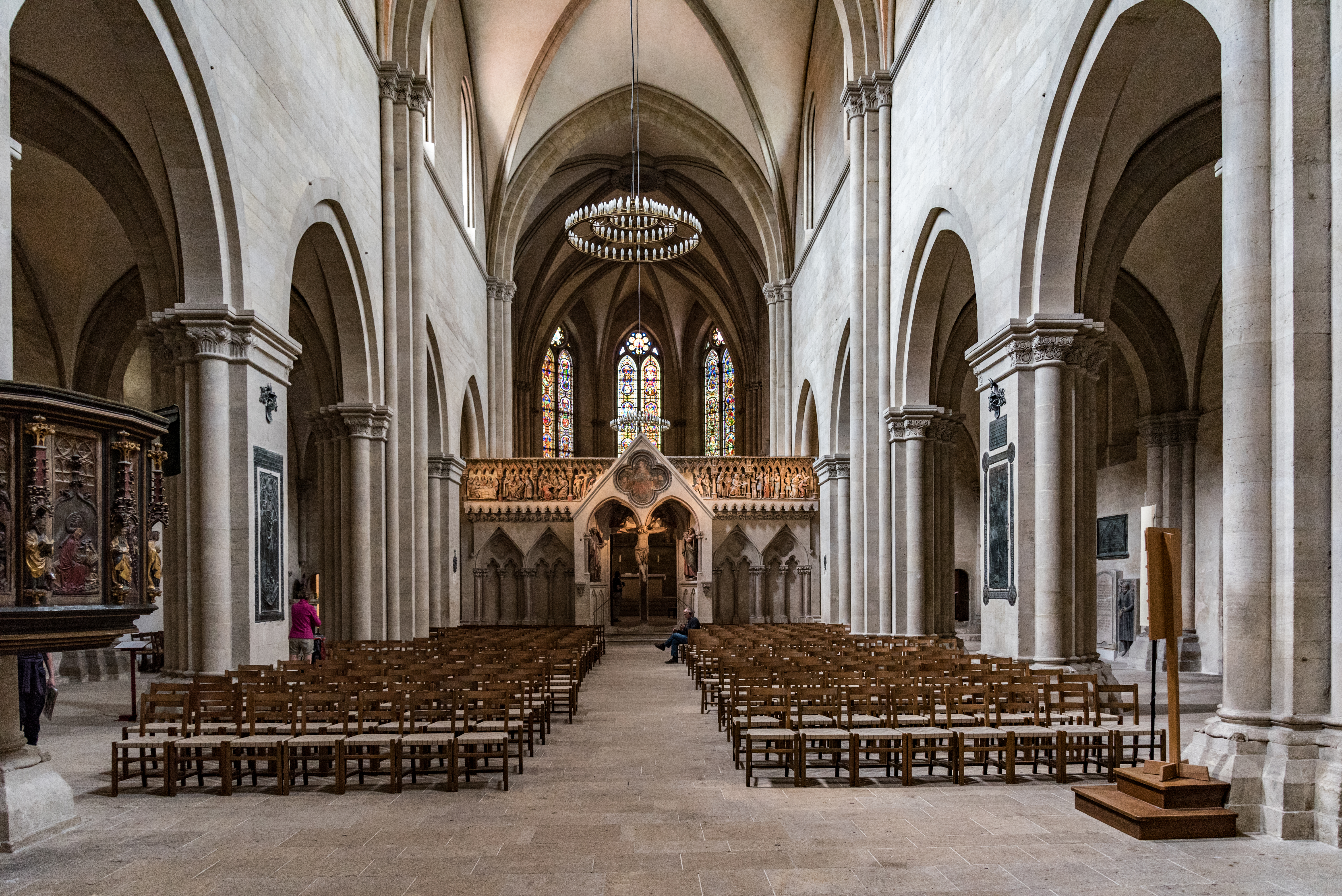 Naumburg an der Saale, Dom, Innenraum